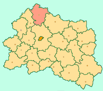 Orel Oblast map by Al Silonov Карта районов Орловской области